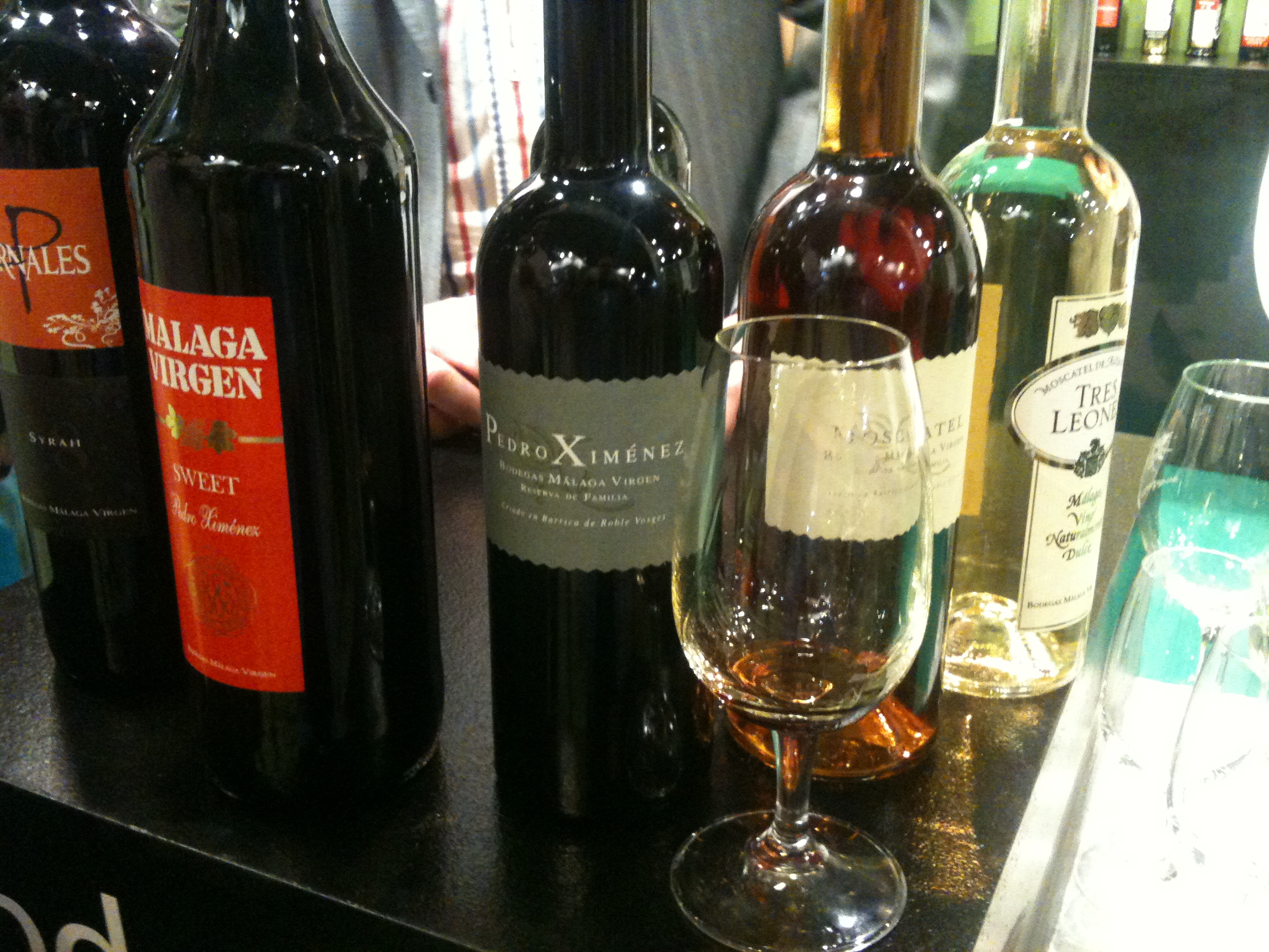 Vinos de la Bodega Málaga virgen y detalle de la botella de "Pedro Ximénez Reserva de Familia"